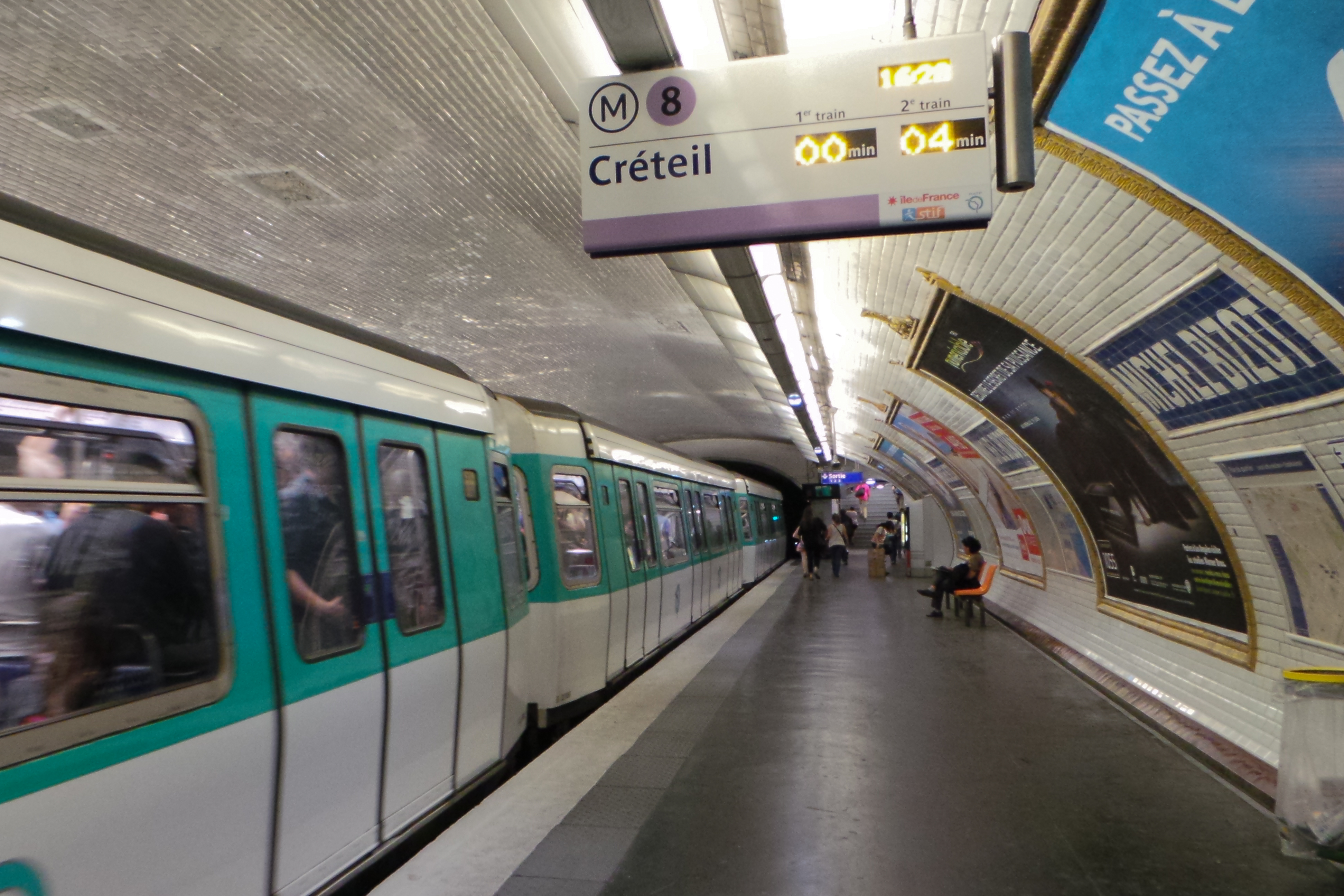 Station de métro Michel Bizot, ligne 8 du métro de Paris - Paris, France